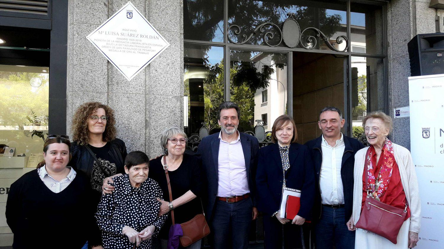 Desde hoy martes, 14 de mayo, una placa en la Avenida Alfonso XIII, 151, recuerda quién fue Mª Luisa Suárez Roldán. En este edificio residió Mª Luisa hasta su fallecimiento a comienzos del presente año. Con el acto de hoy el distrito de Chamartín ha querido rendir homenaje a su vecina, reconocida abogada laboralista y pionera en este ámbito jurídico durante el franquismo